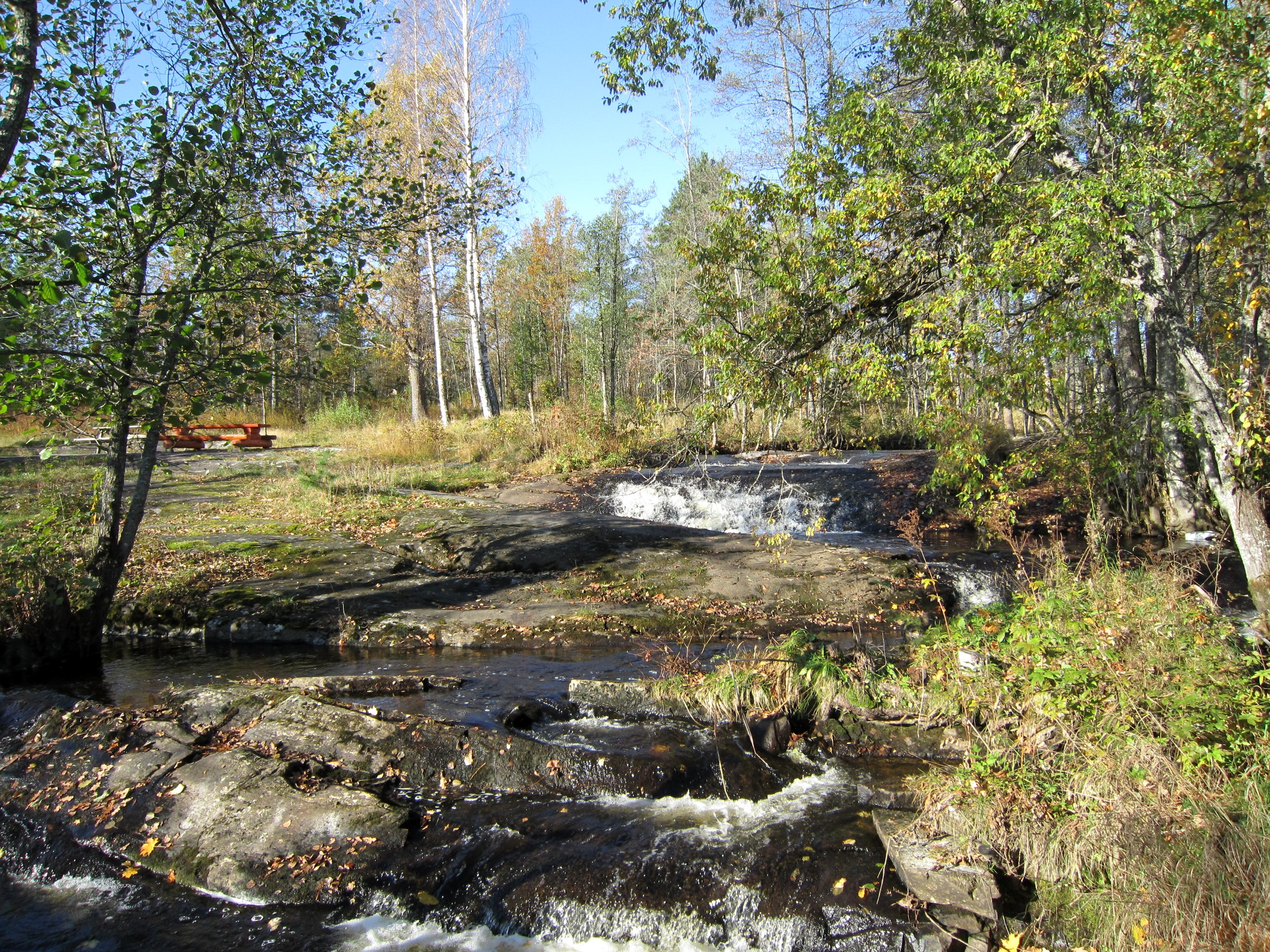 Fiskumelva nær utløpet, like ved FIskum gamle kirke